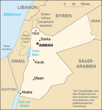 Karte Jordaniens, aus CIA World Factbook, übersetzt auf Englisch: File:Jo-map.png auf